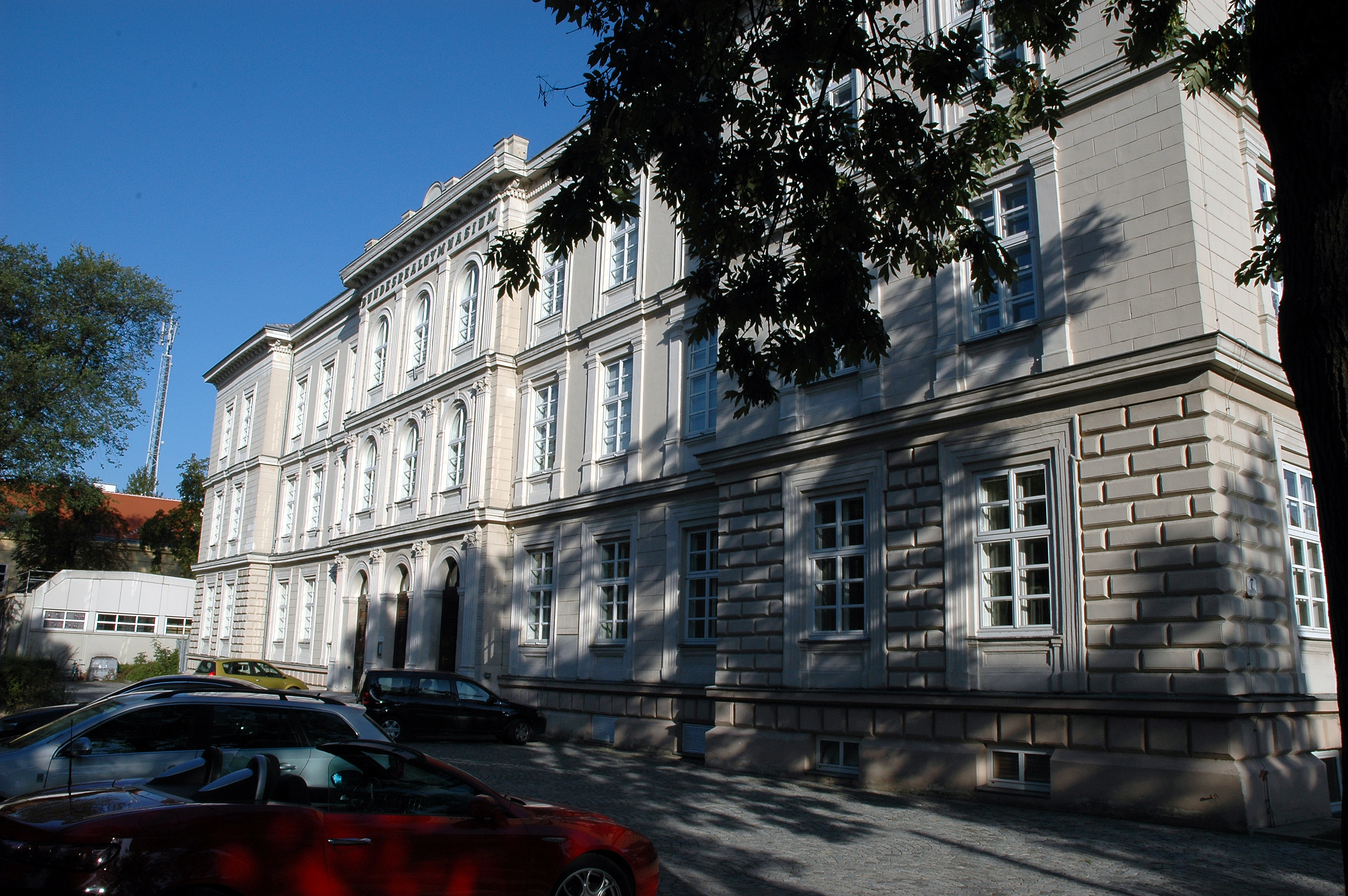 Ringstraßengymnasium Krems, Krems an der Donau